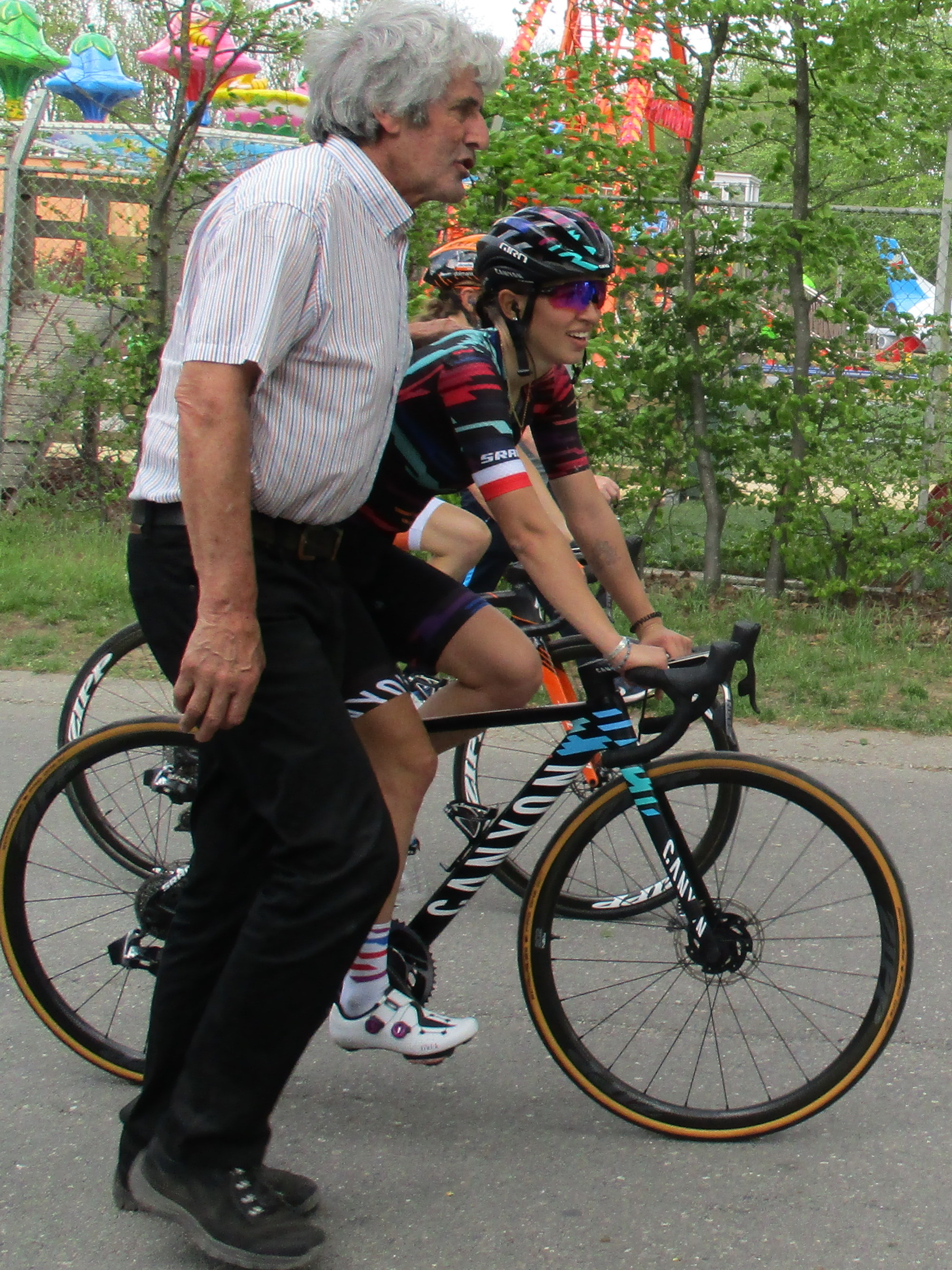 Finish van de Waalse Pijl 2019 voor vrouwen op de Mur de Huy